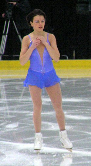 Maria Petrova während der Russischen Meisterschaften 2005